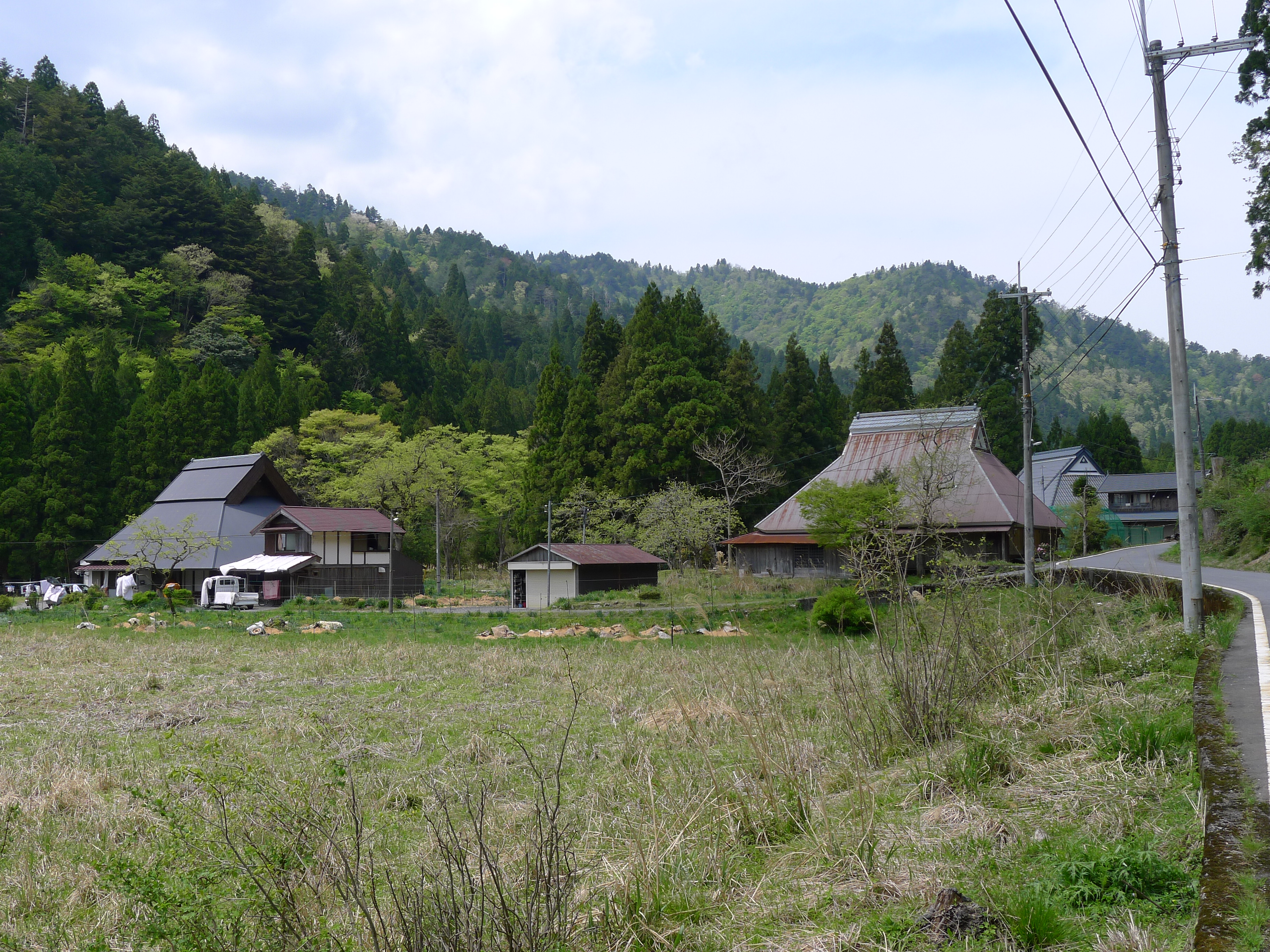 京都市左京区の北部山間地域に位置する久多（中の町）